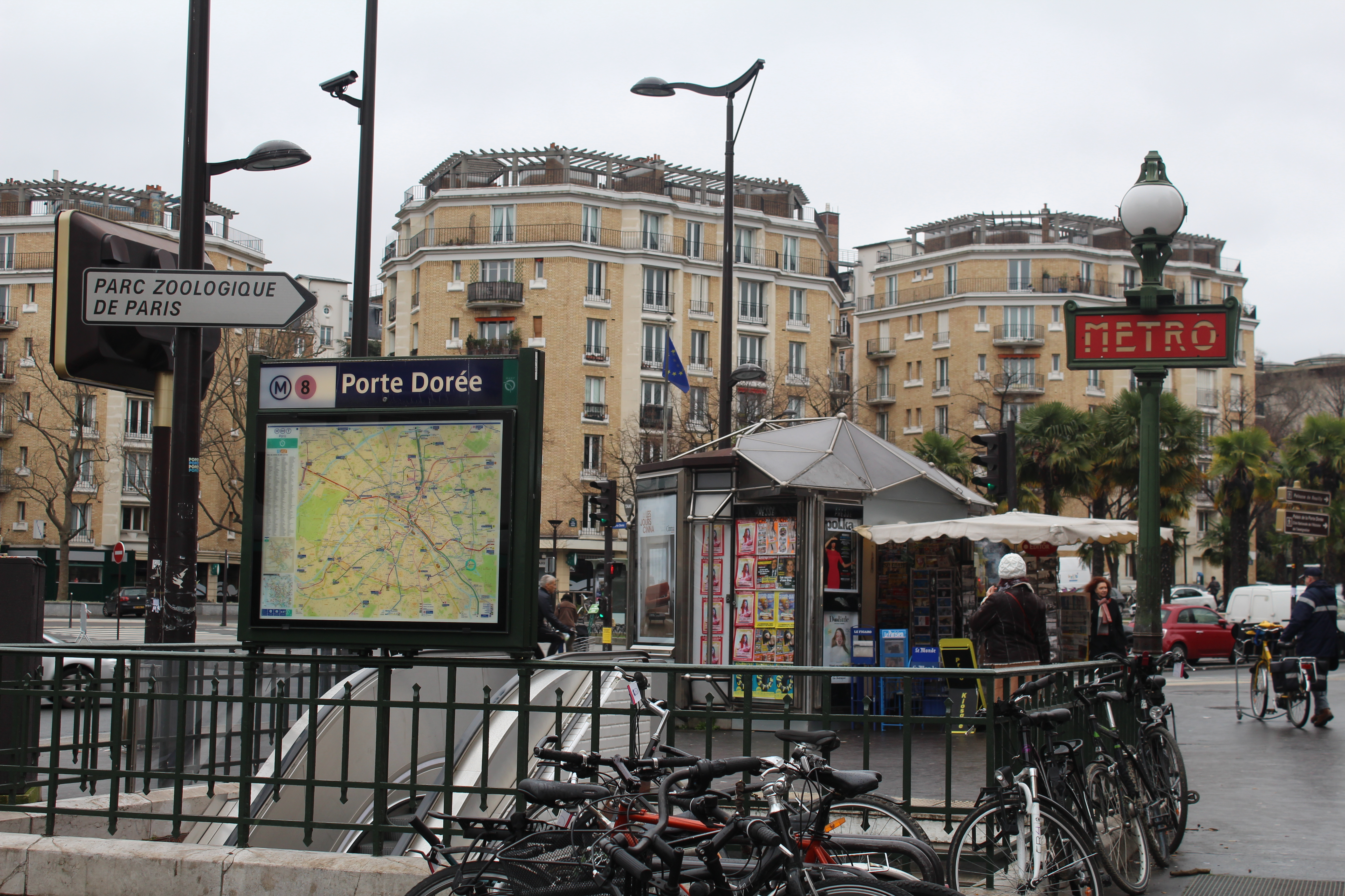 Entrée de la station de métro Porte Dorée à Paris.